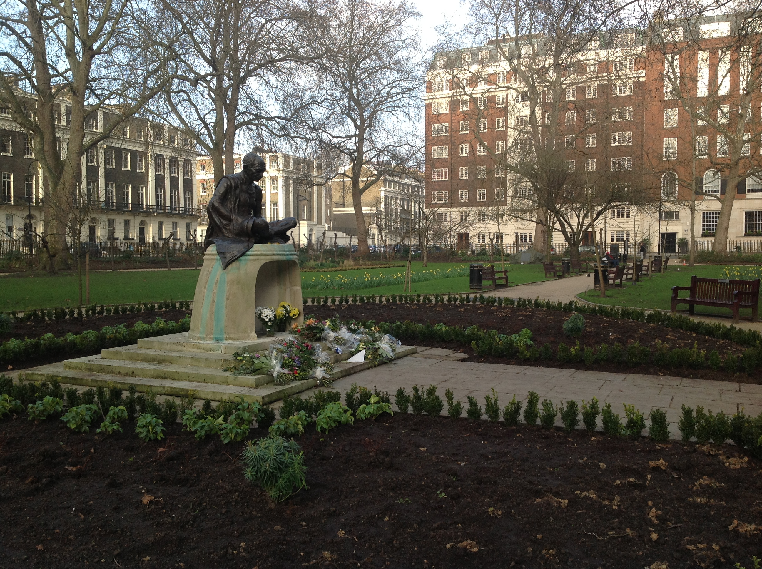 Tavistock Square in London. Tavistock Court on Endsleigh Place can be seen behind the trees.